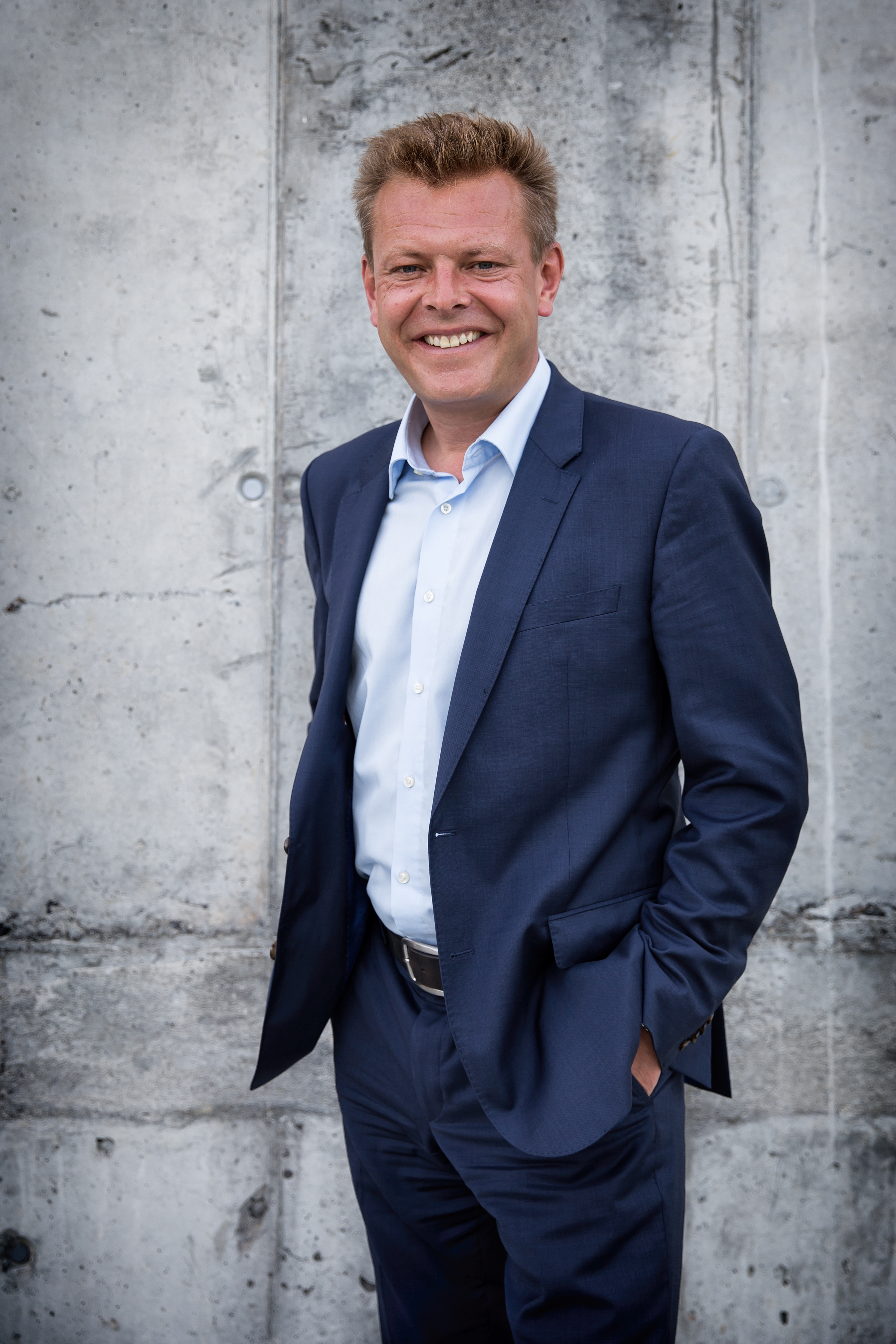 Reto Nause (2016)